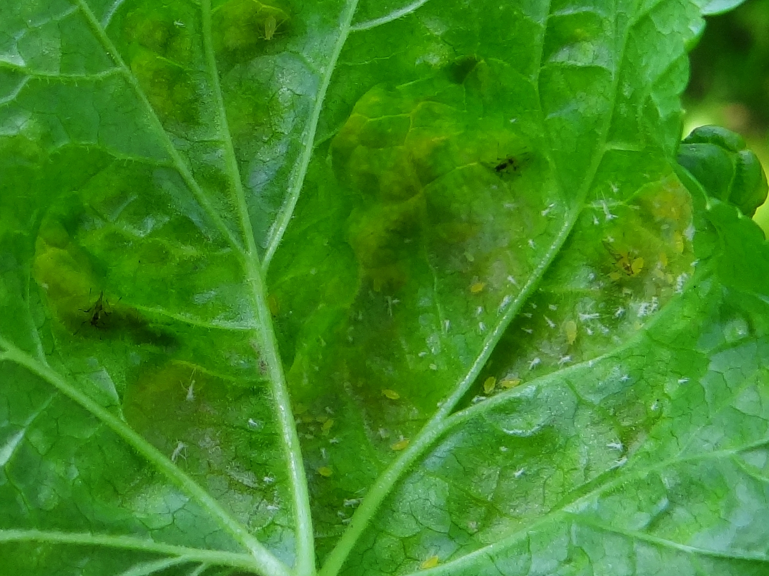 'Cryptomyzus ribis on leaf Ribes niger. Location: Poland, Trzciana, województwo małopolskie